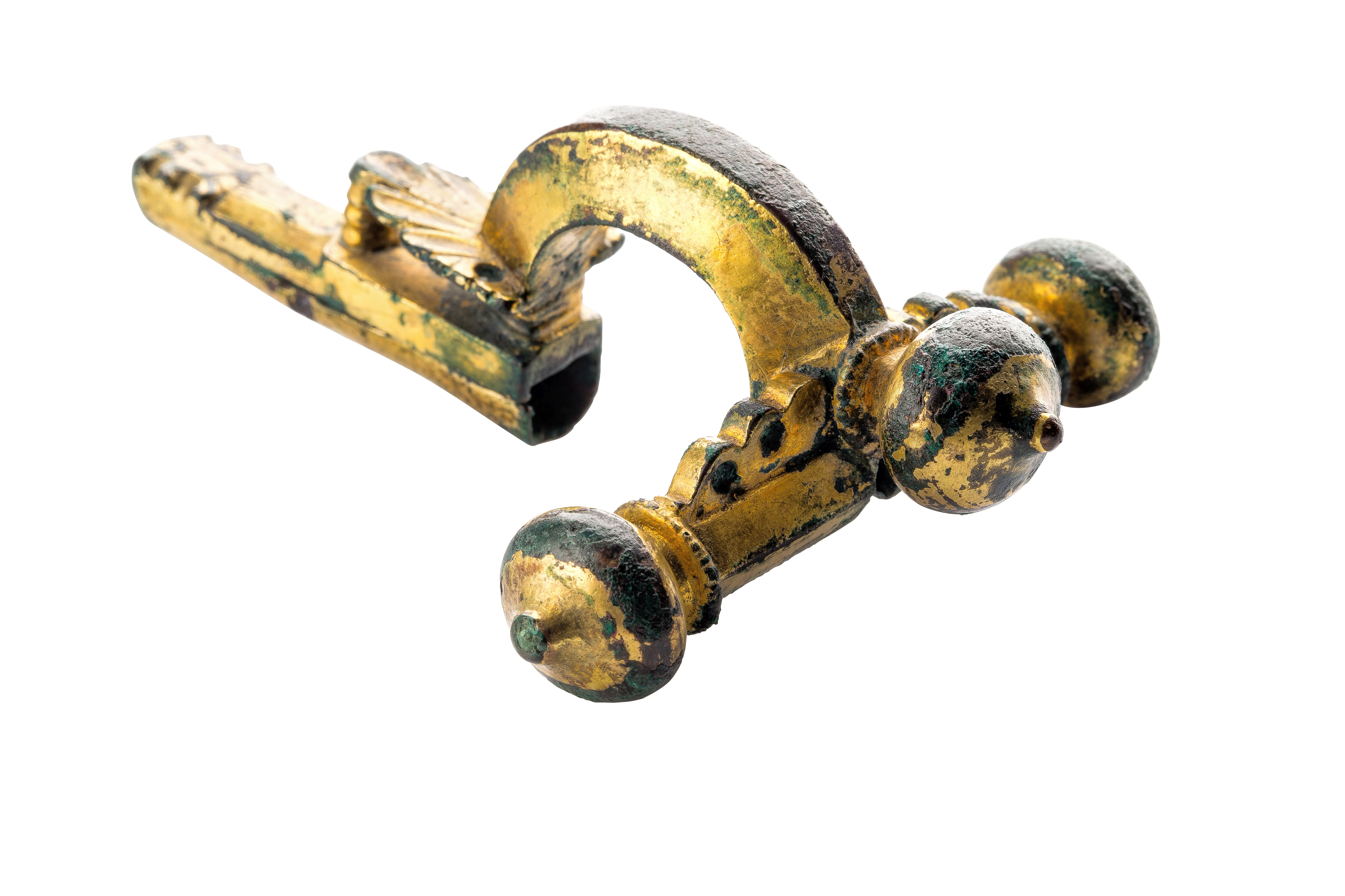 Drieknoppenfibula in verguld brons, 300 tot 365 NC, vindplaats: Koninksem, Aan Paspoel, zuidwestgrafveld, 1974, graf 99 , collectie Gallo-Romeins Museum Tongeren, 74.A.35, 004